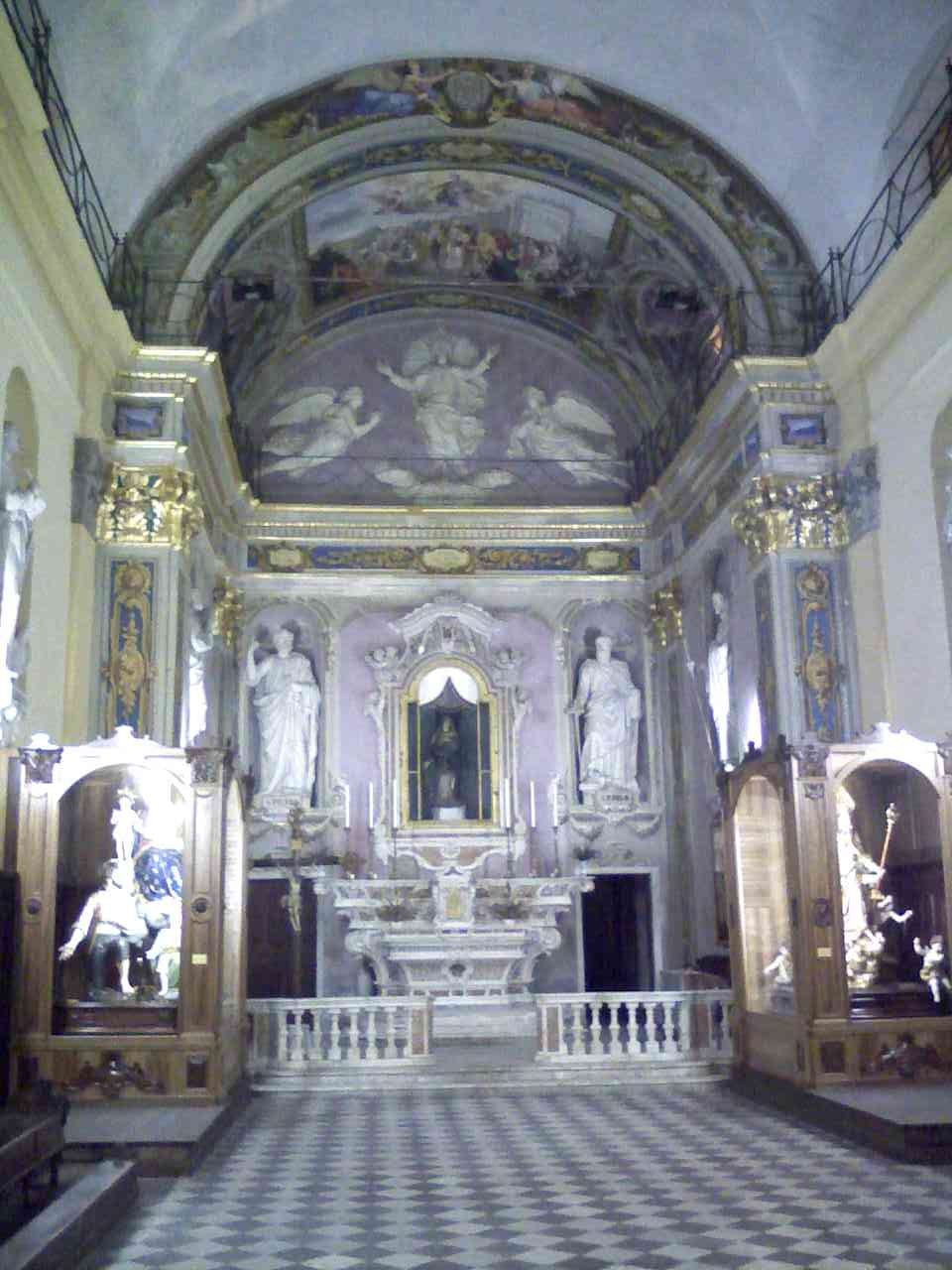 Interno dell'oratorio di Santa Maria Maggire in Albisola Superiore (Italy)